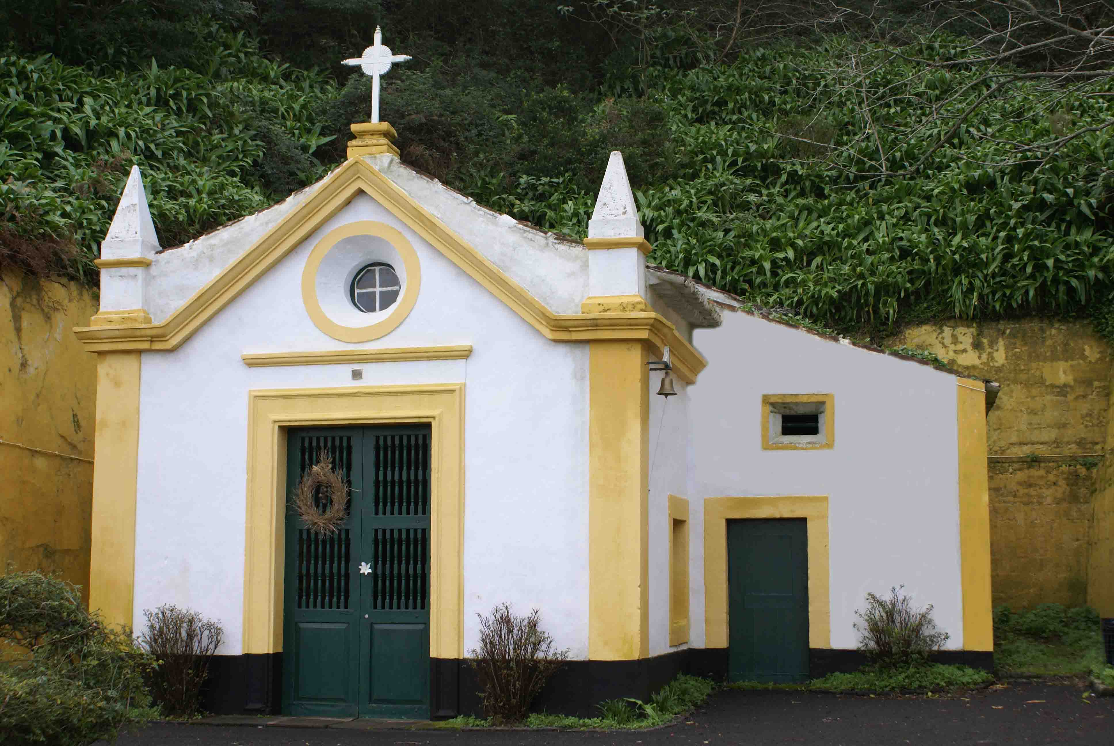 Ermida de Santo António, fachada principal, Monte Brasil, ilha Terceira, Açores, Portugal.